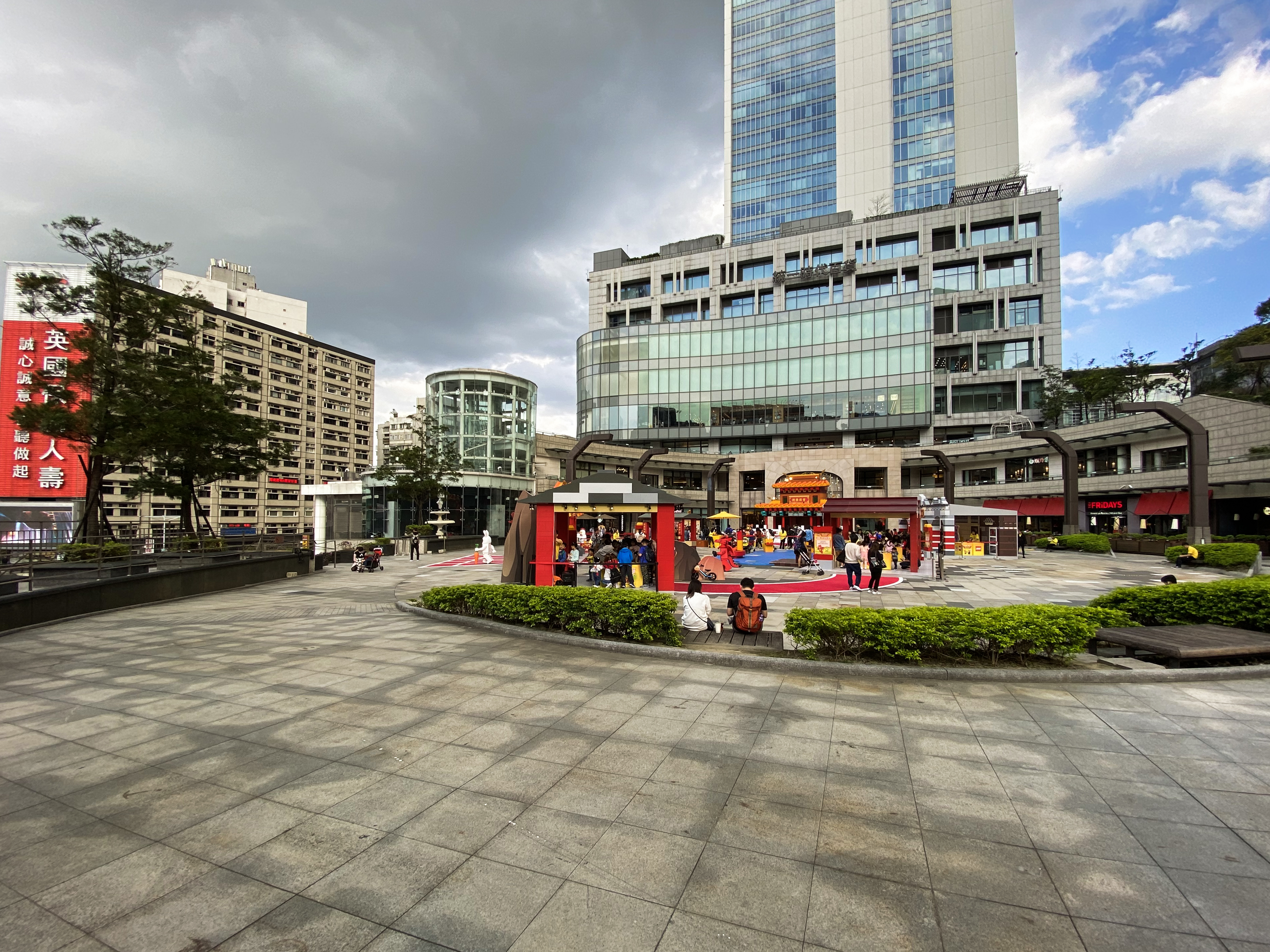 Uni-President Department Store Taipei